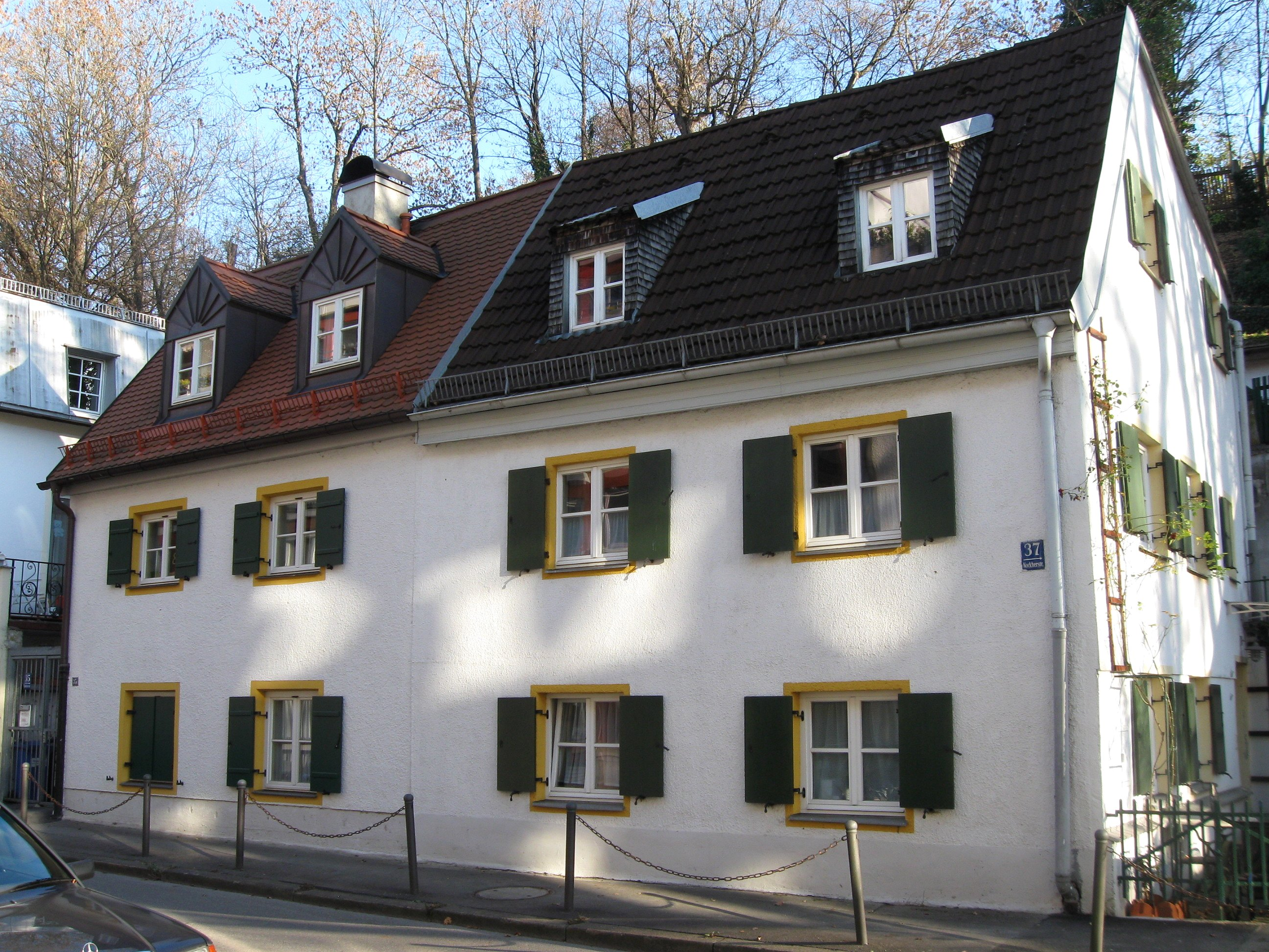 Nockherstraße 35-37; Zweigeschossiges Kleinhaus, um 1800